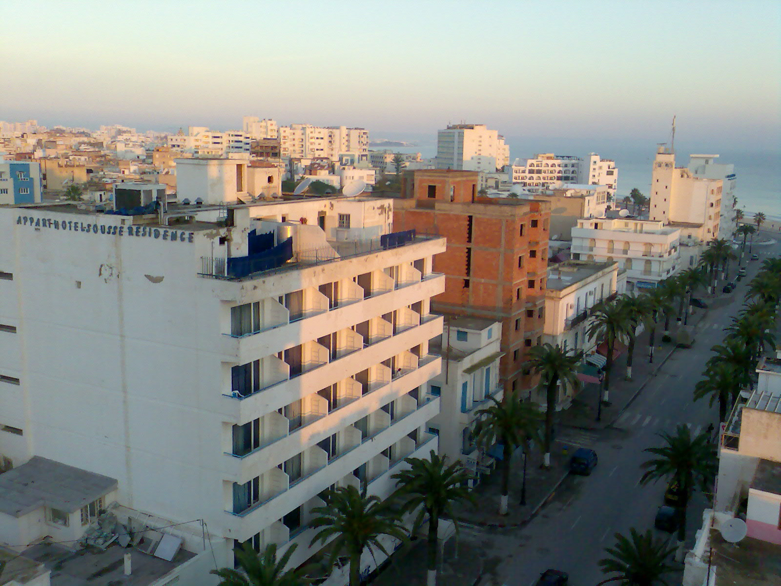 Blick vom Buero in Sousse